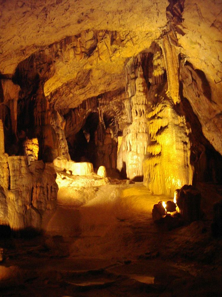 Grotte d'Osselle, Doubs, France Source: photo perso Rémi Stosskopf Date: 28/04/2004